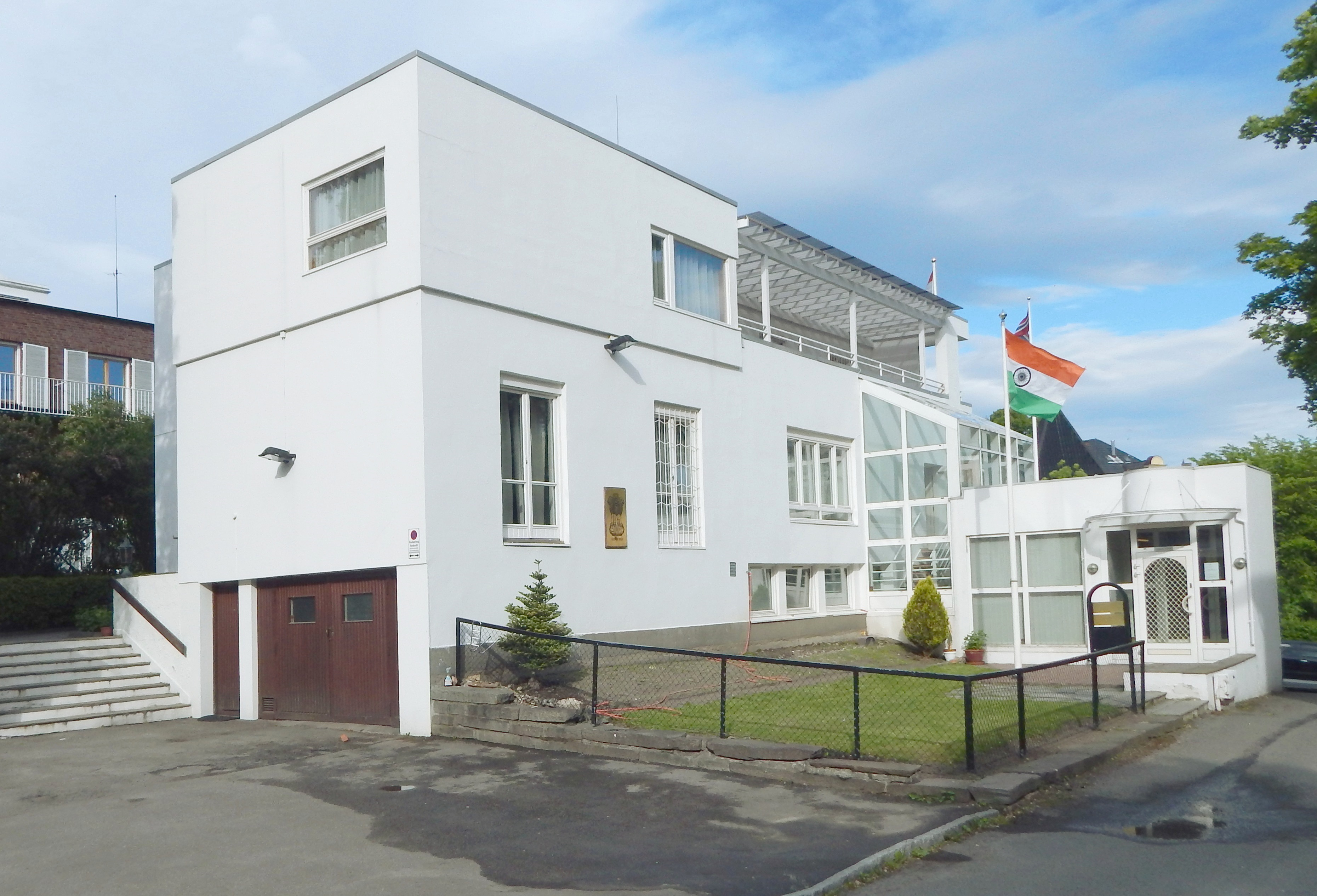 Indias ambassade i Niels Juels gate 30 (arkitekter: Blakstad og Munthe-Kaas)